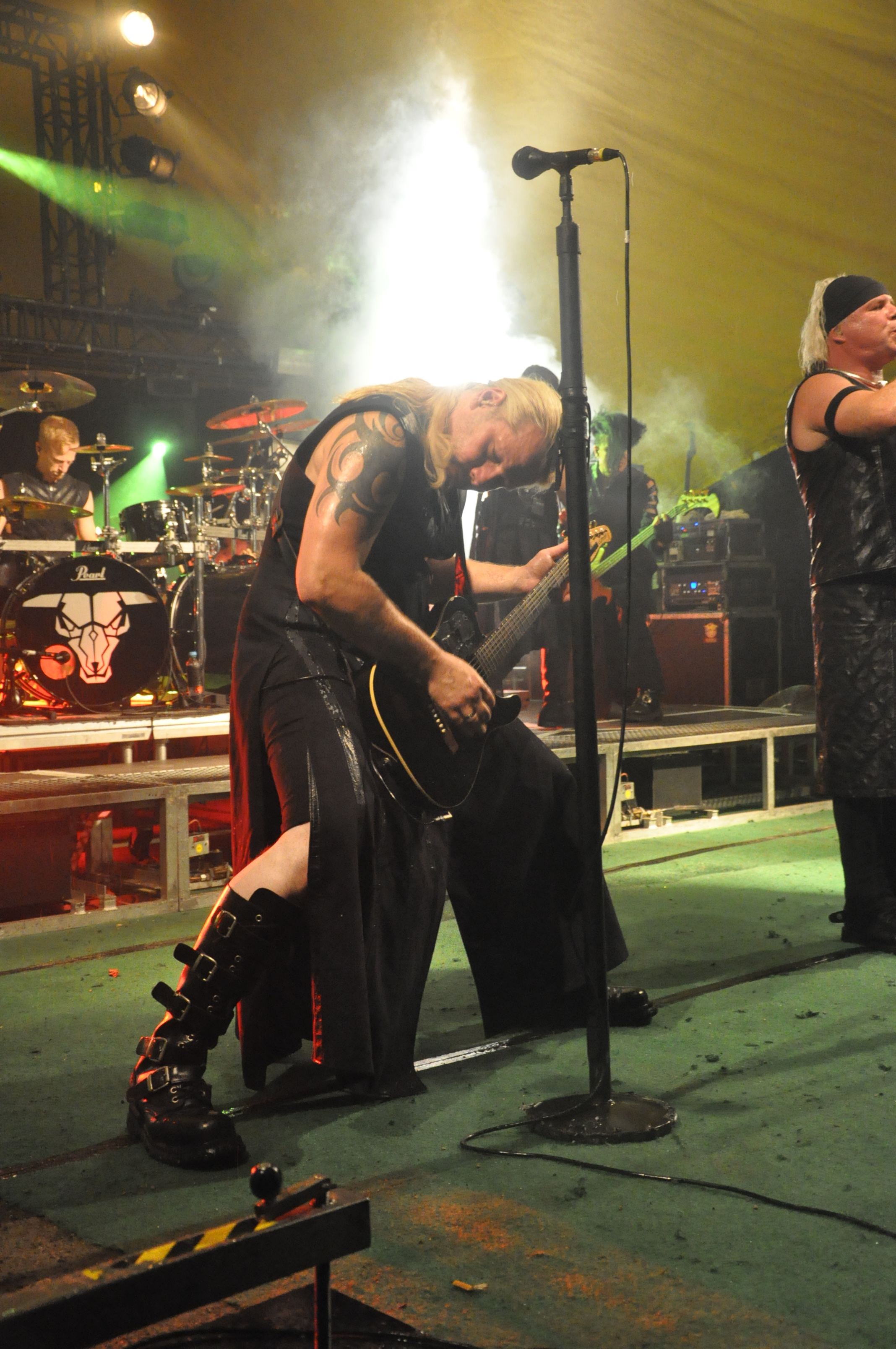 Feuertal 2013 in Wuppertal auf der Waldbühne Hardt: Gruppe Subway to Sally